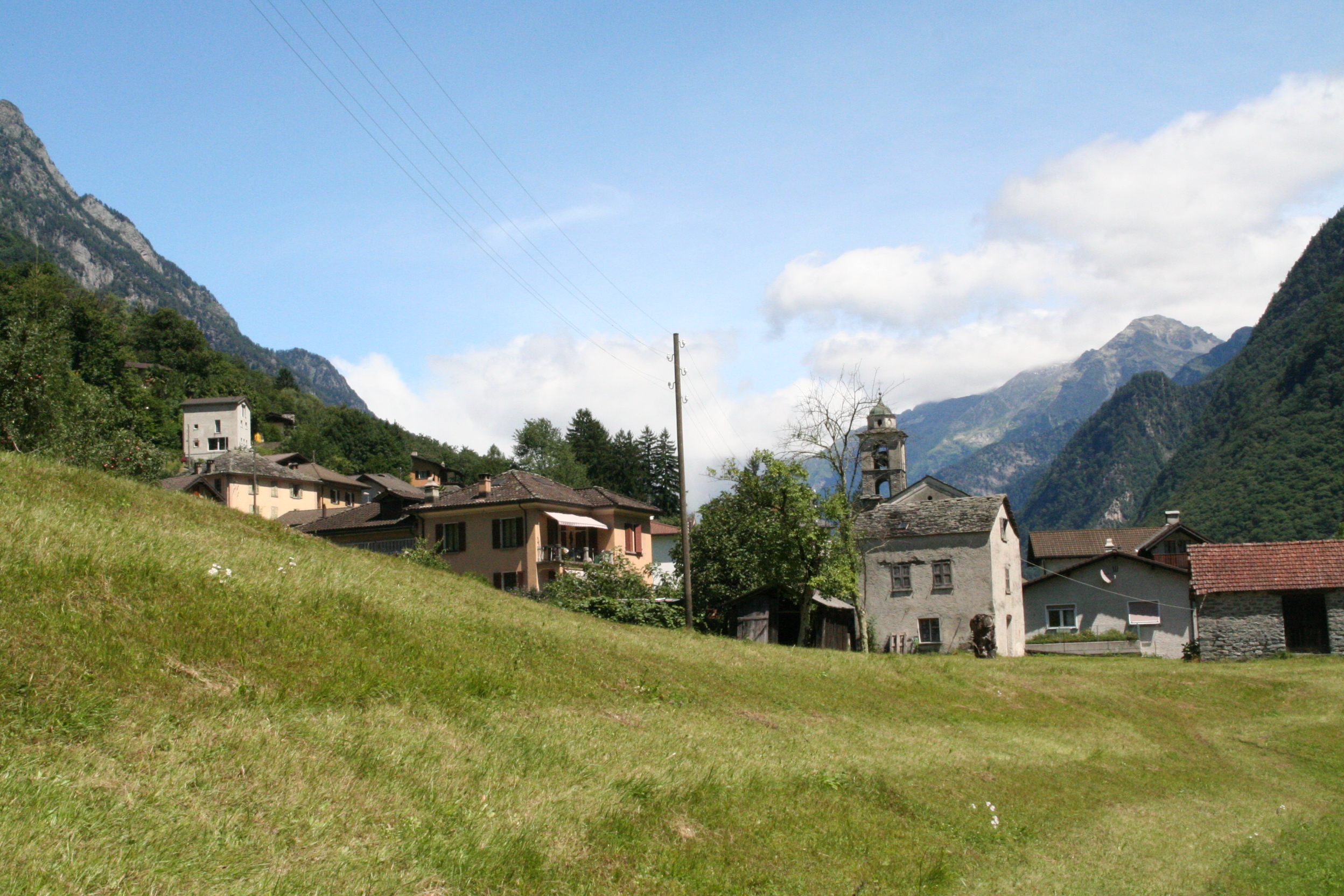 Leggia